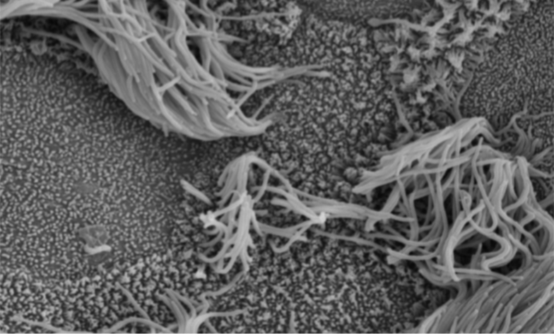 Fig. 3. Análisis ultraestructural de la superficie apical de cultivos de células epiteliales traqueales ovinas por SEM. Los cultivos de células epiteliales traqueales ovinas se cultivaron a un ALI interface aire-líquido, se fijaron y procesaron para SEM. Las imágenes fueron tomadas a 5000 aumentos.